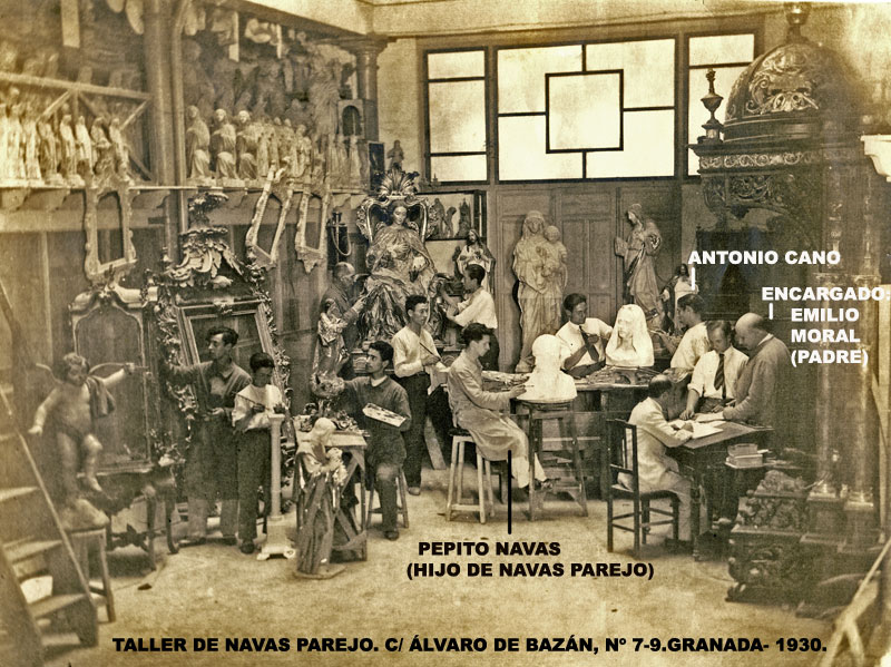 Antonio Cano en el taller de Navas Parejo de la Calle Álvaro de Bazán Nº 7-9 de Granada en el año 1930. En la foto se puede ver a Antonio Cano policromando un busto de una Virgen. También se observa en la foto al encargado, Emilio Moral padre, ya que su hijo también se llamaba Emilio Moral y fué escultor y era intimo amigo de Antonio Cano.En la foto también aparece Pepito Navas, que era el hijo de Navas Parejo.